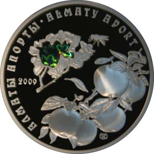 Памятная монета Республики Казахстан «Алматинский апорт» из серии «Растительный мир Казахстана» - 500 тенге - серебро - реверс